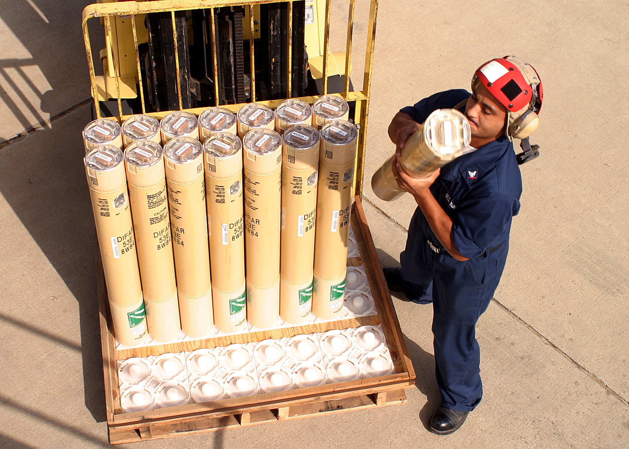 Sonobuoys